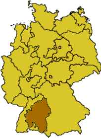 Ekd-wuerttemberg